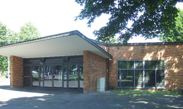 Beethovenhalle in Bonn – Eingang